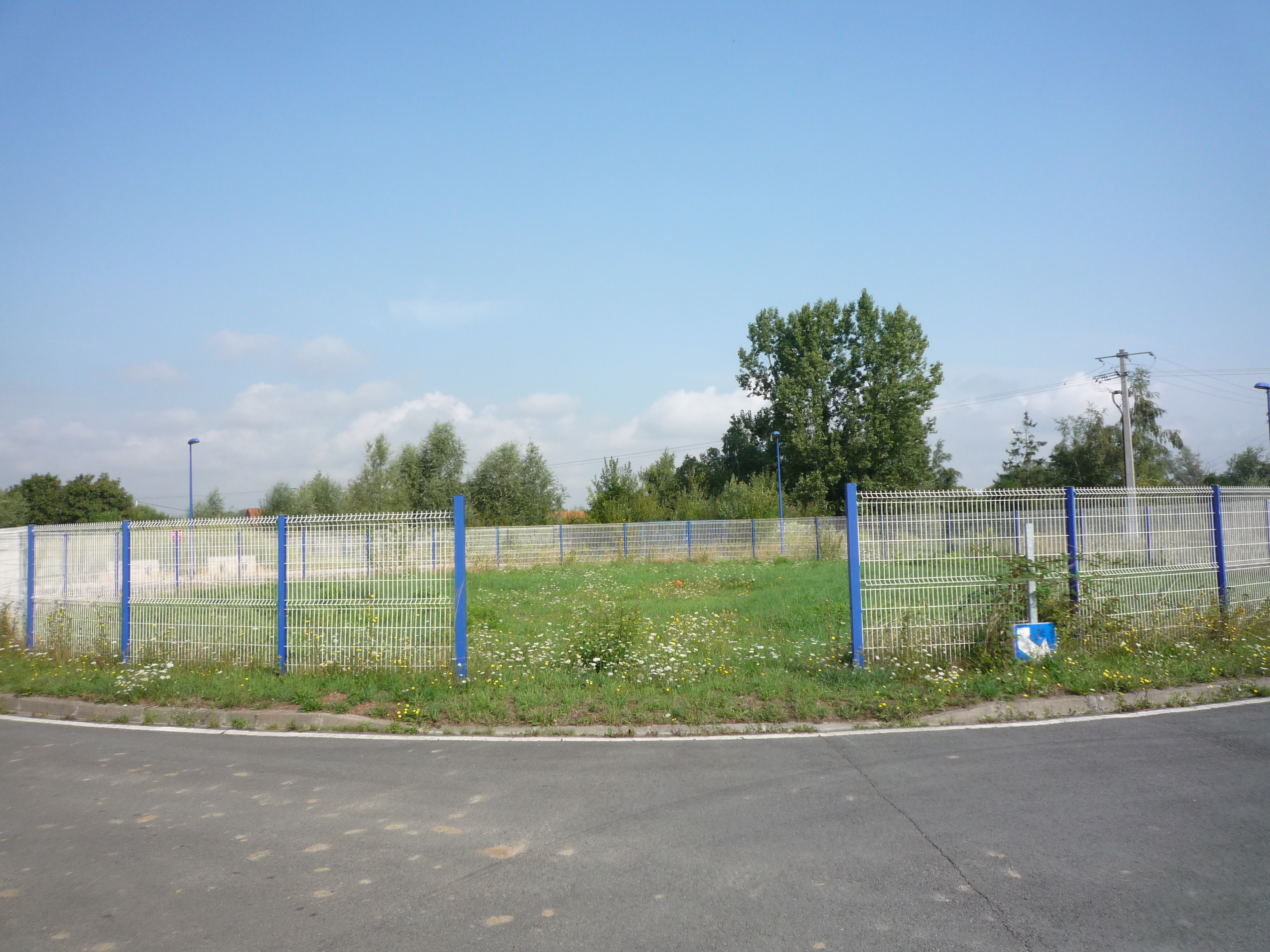 La Seconde Fosse de Marchiennes de la Compagnie des Canonniers était un charbonnage constitué d'un seul puits situé à Marchiennes, Nord, Nord-Pas-de-Calais, France.